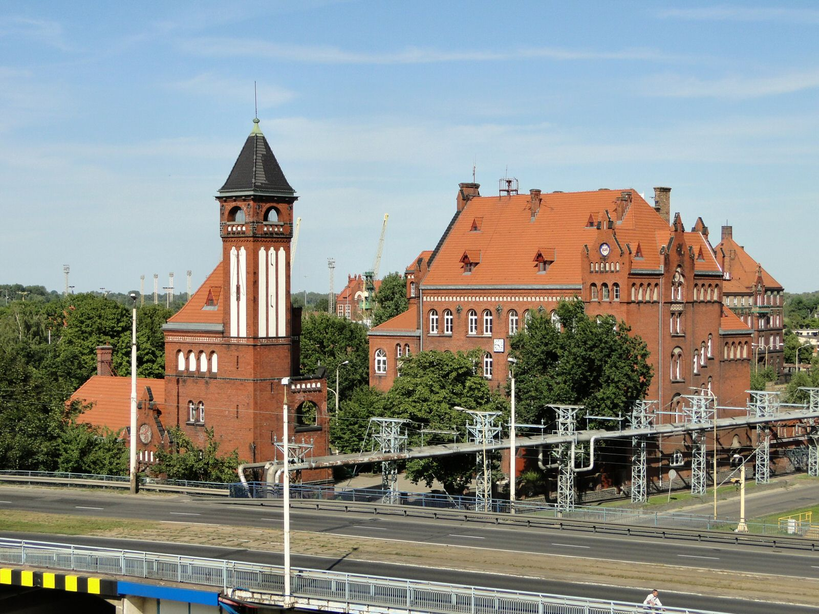 Zabudowania Portowej Straży Pożarnej przy ul. Bytomskiej w Szczecinie.